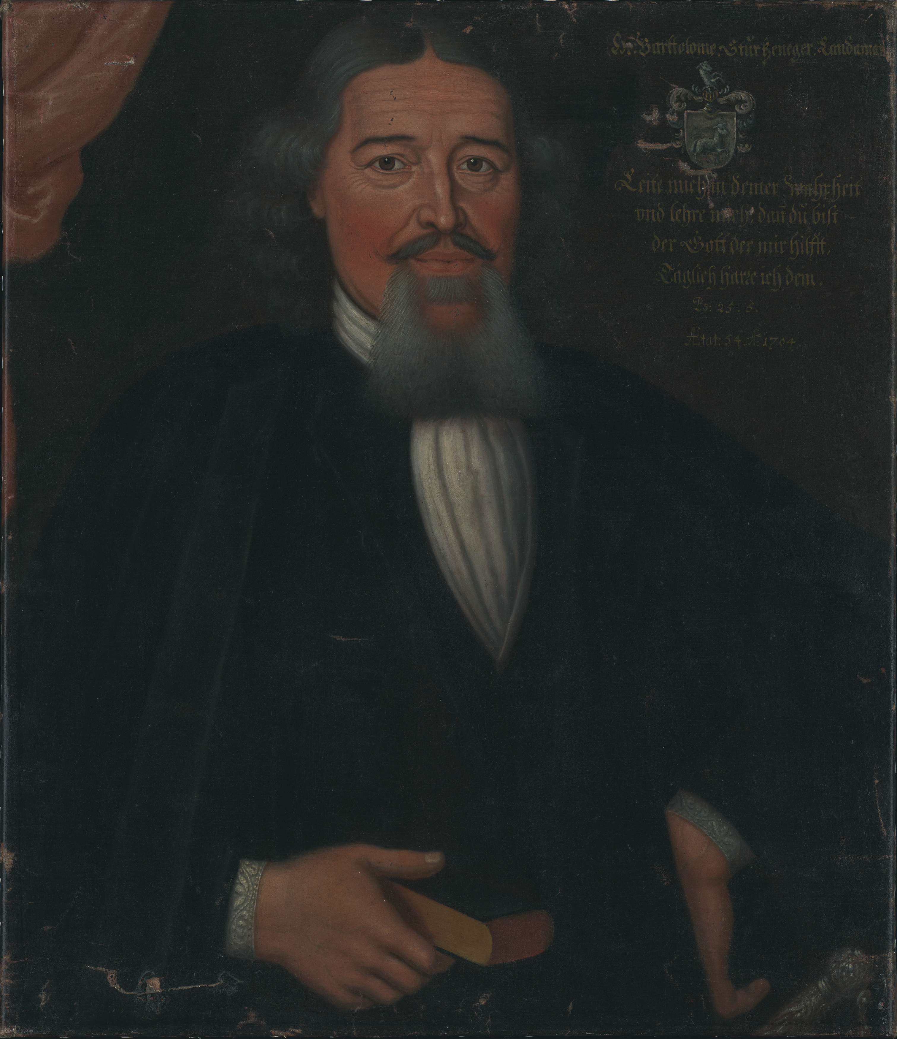 15. Landammann von Appenzell Ausserrhoden, Brustbildnis